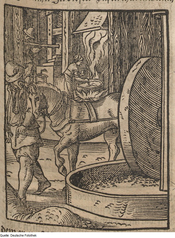 Original image description from the Deutsche Fotothek Ständebuch & Beruf & Handwerk & Seifensieder